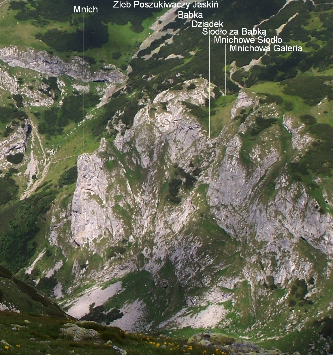 Mnichowe Turnie. Widok z Czerwonego Grzbietu